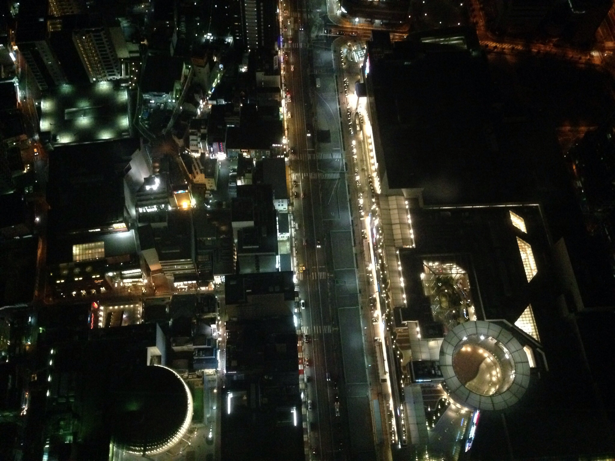 あべのハルカス60階展望台より、あべの筋近辺のあべのキューズタウン（右側）、あべのHoop（左側）を見る。